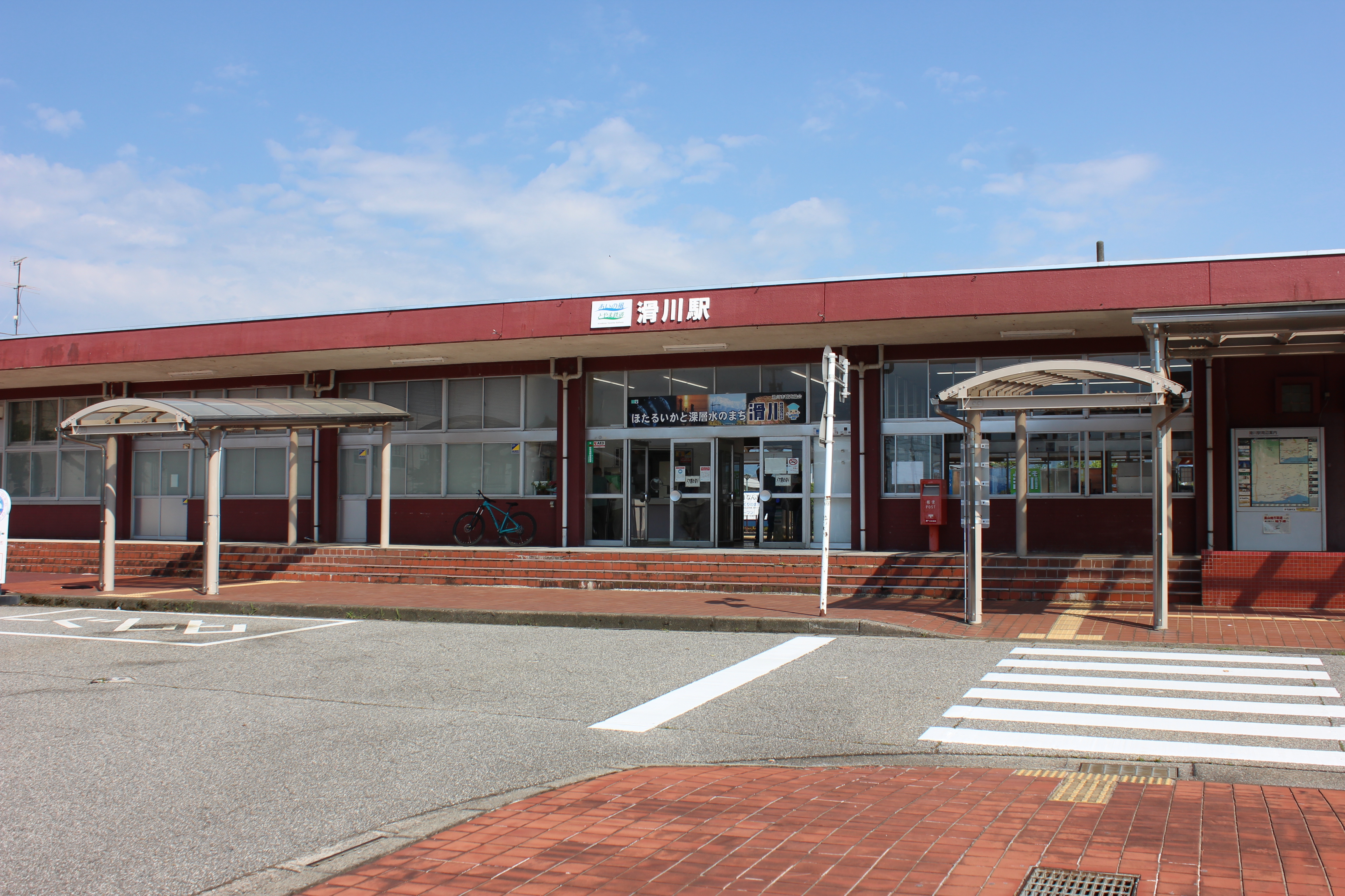 あいの風とやま鉄道滑川駅（富山県滑川市） Canon EOS Kiss X5